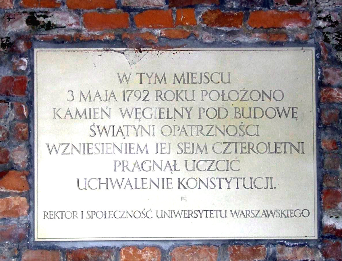 Świątynia Opatrzności Bożej, Ogród Botaniczny UW w Warszawie